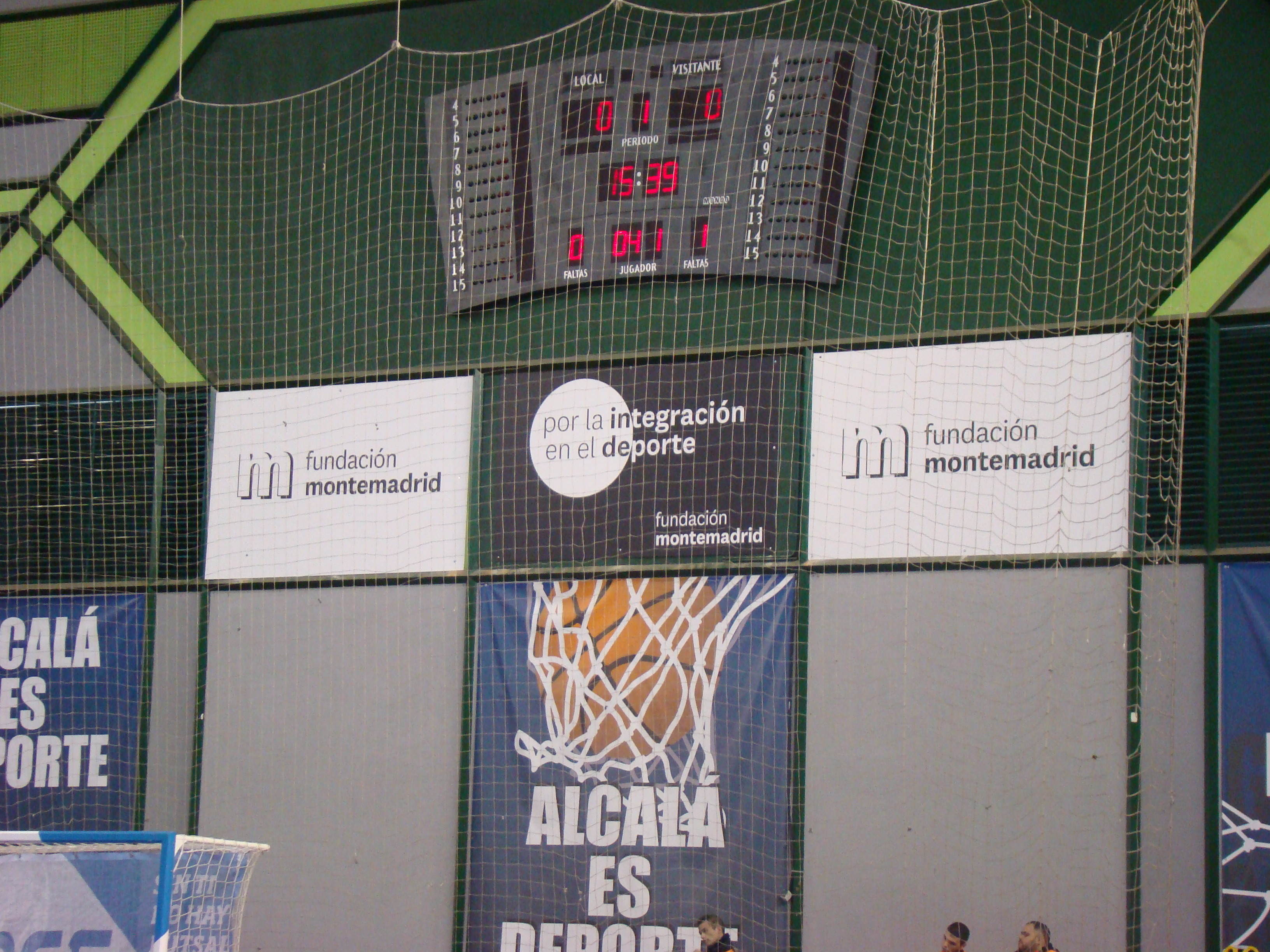 fondo del pabellon montemadrid